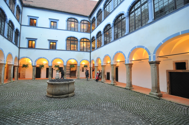 Atrij Gradu Sevnica